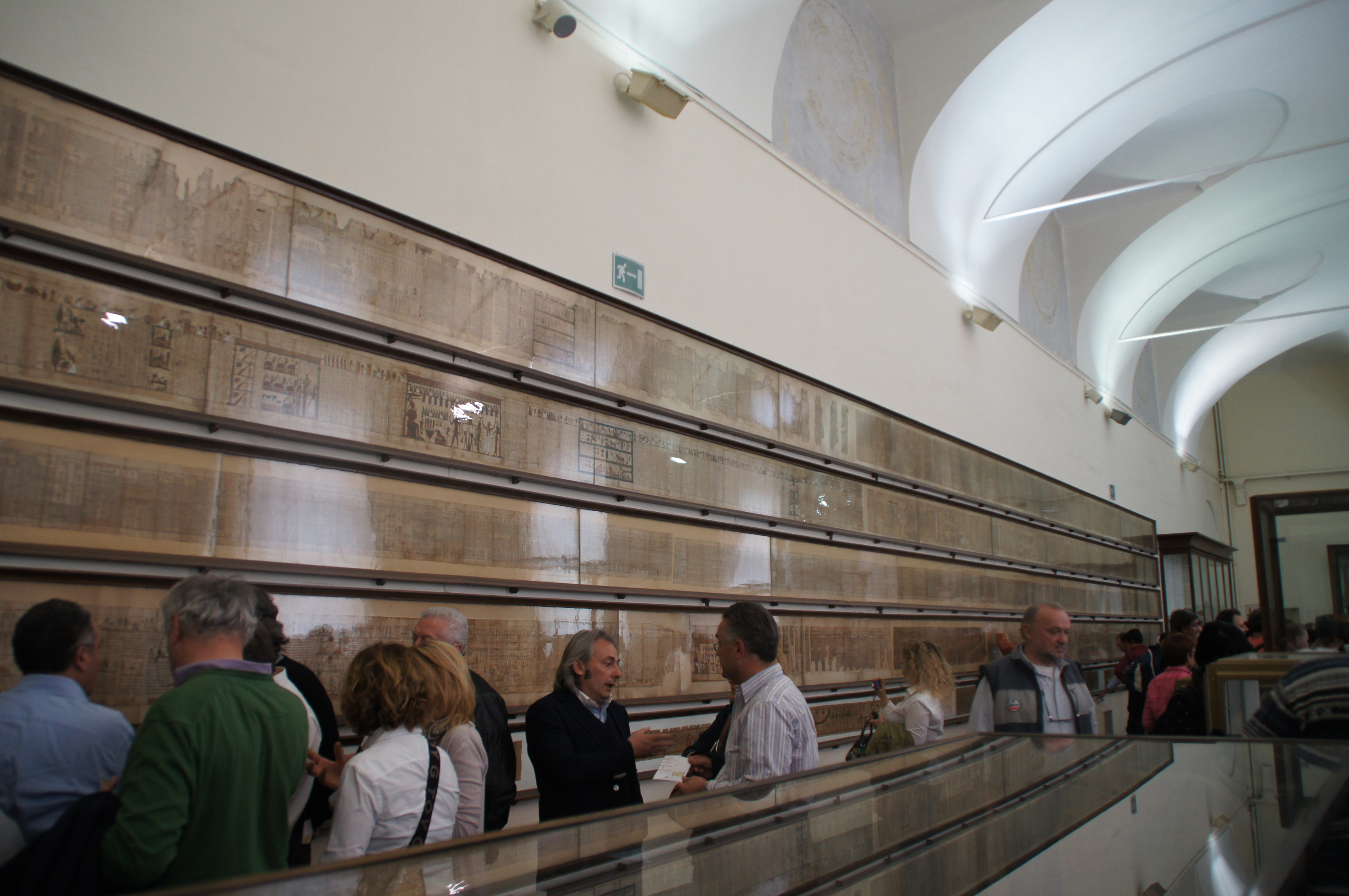 Museo Egizio